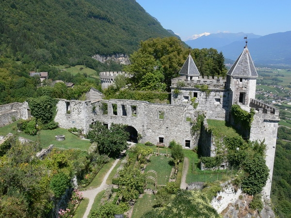 Château de Miolans dans la combe de Savoie. Vue plongeante (depuis la tour St Pierre) sur la haute cour où est aménagé un jardin médiéval. Au fond le Mont Blanc!